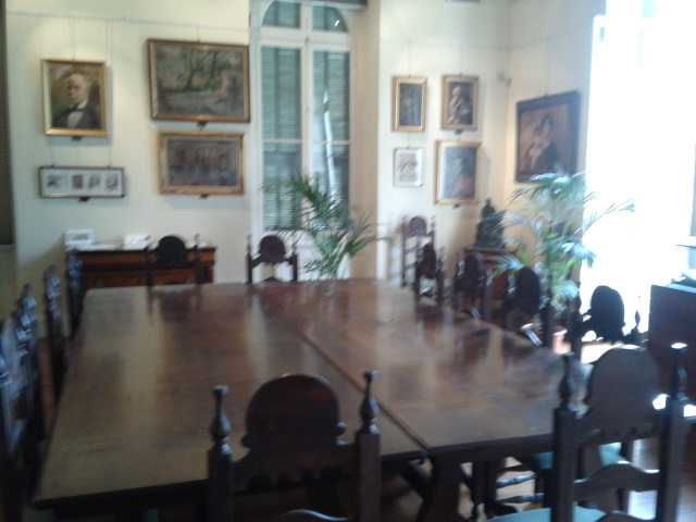 Intérieur de l'Institut International des Etudes Ligures